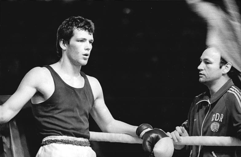 Henry Maske, Manfred Wolke ADN-ZB Lehmann 10.5.83 VRB: 25. Europameisterschften im Boxen in Warna - Vorrunde am 9.5.83 - Im Mittelgewicht wurde der 19jährige ASK-Boxer Henry Maske (im Foto beim Chemiepokal 1983 in Halle mit seinem Klubtrainer Manfred Wolke) einstimmiger Punktsieger über Hartmut Brandau (Österreich).